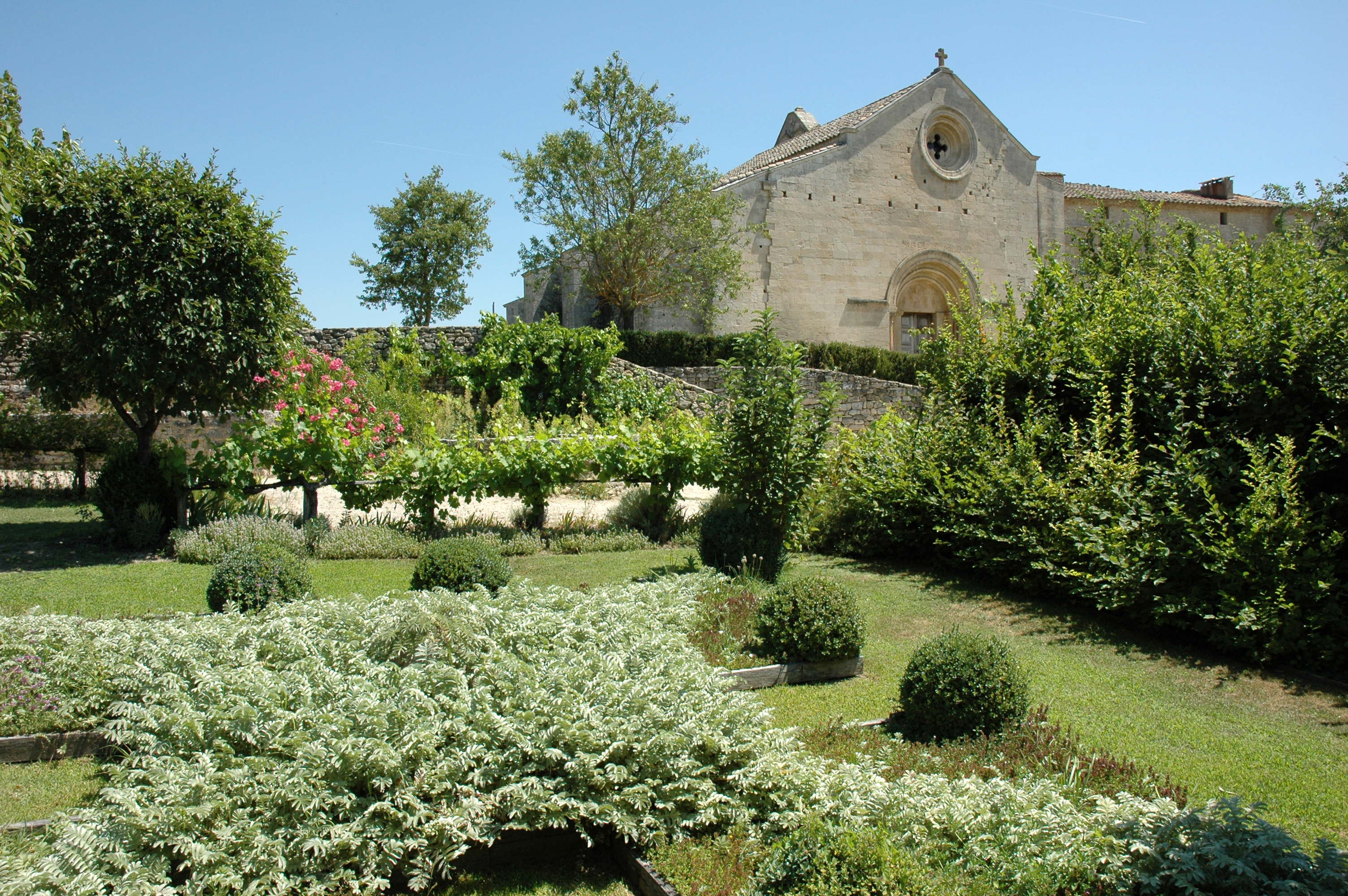 Prieuré Notre-Dame de Salagon